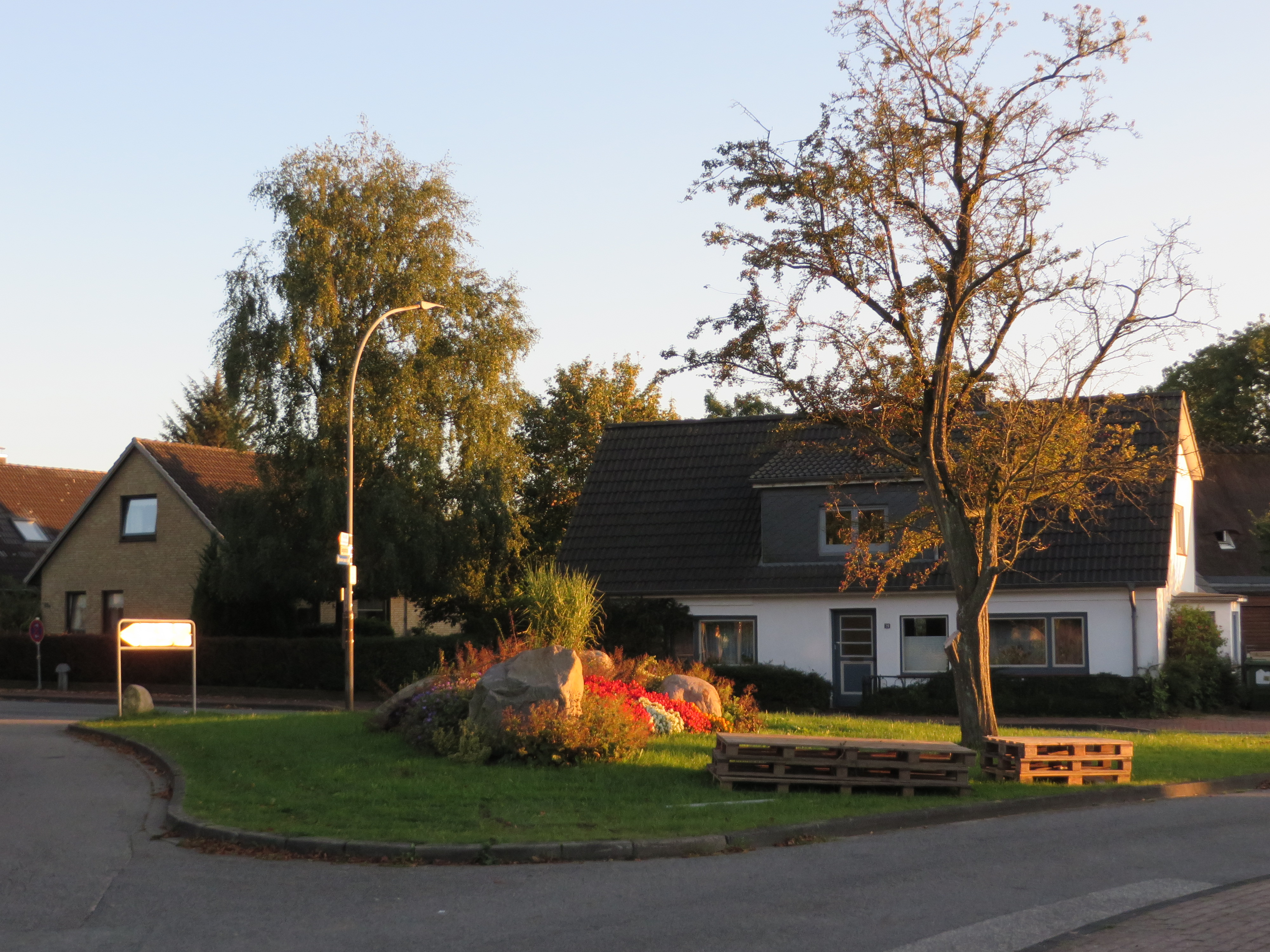 Dreieckiger Platz bei der Westerstraße 29 (Harrislee September 2014)